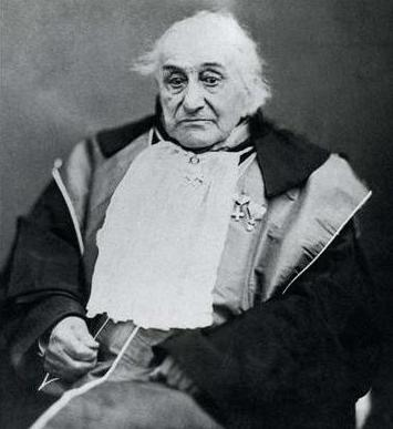 Antonio Bertoloni (1775 – 1868)